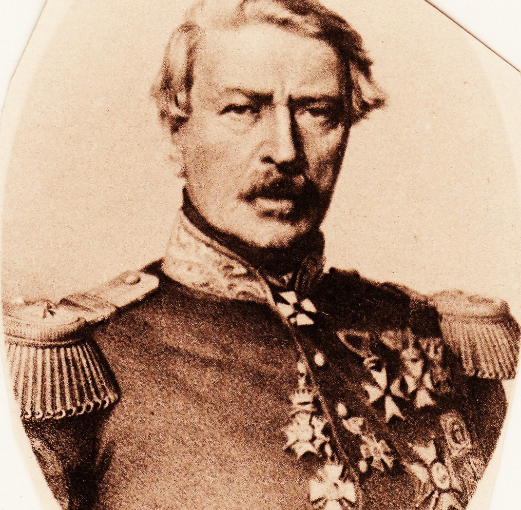 JJ van Mulken